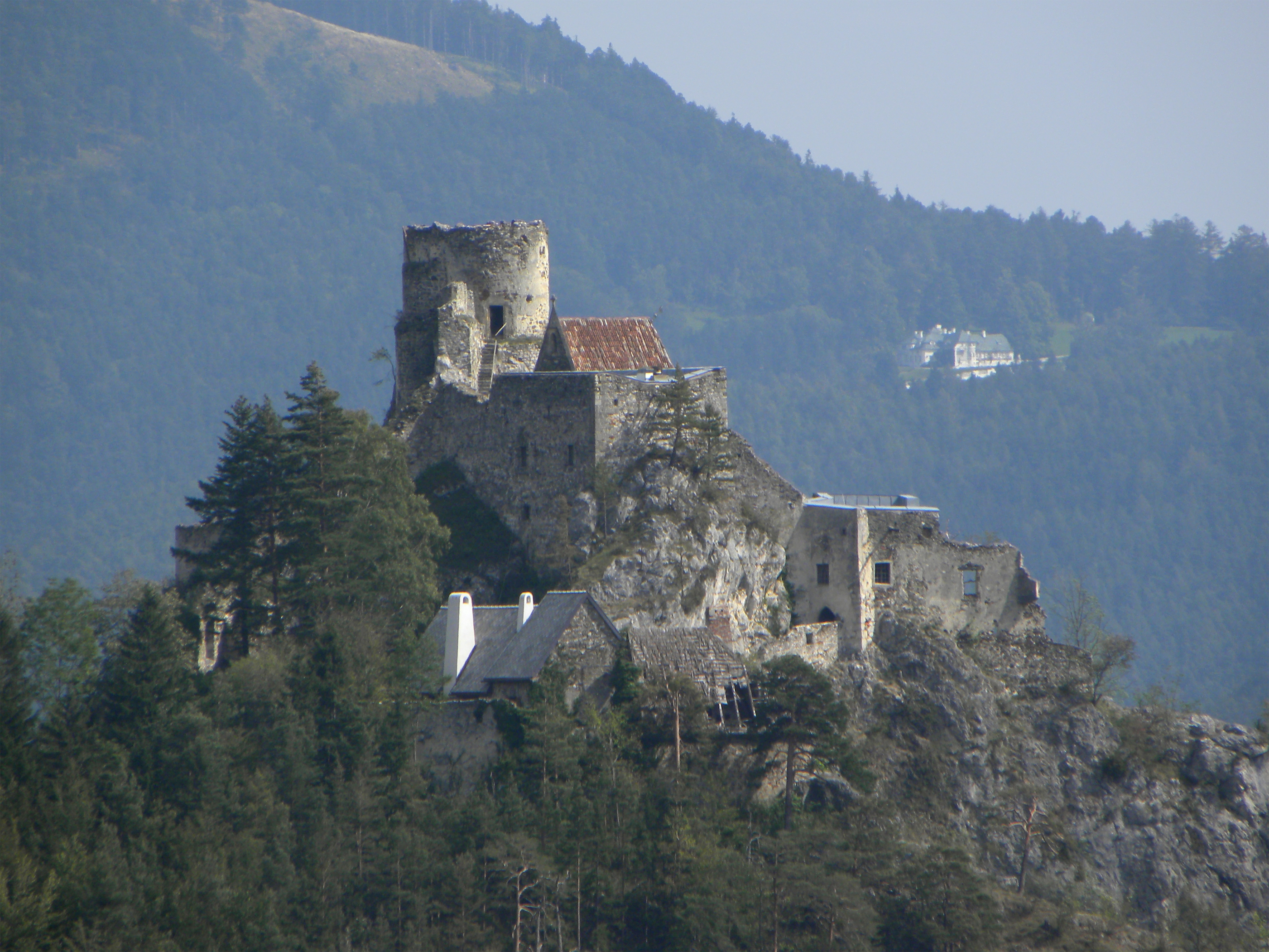 Burgruine Klamm